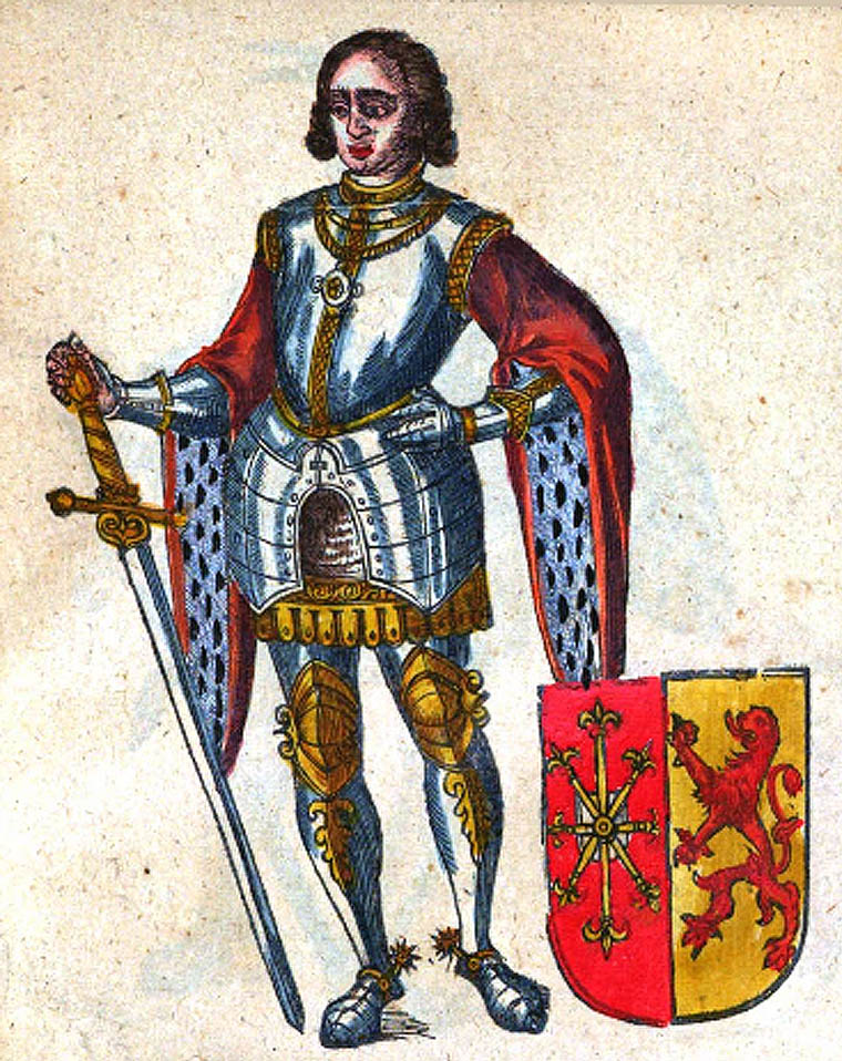 Diederik II